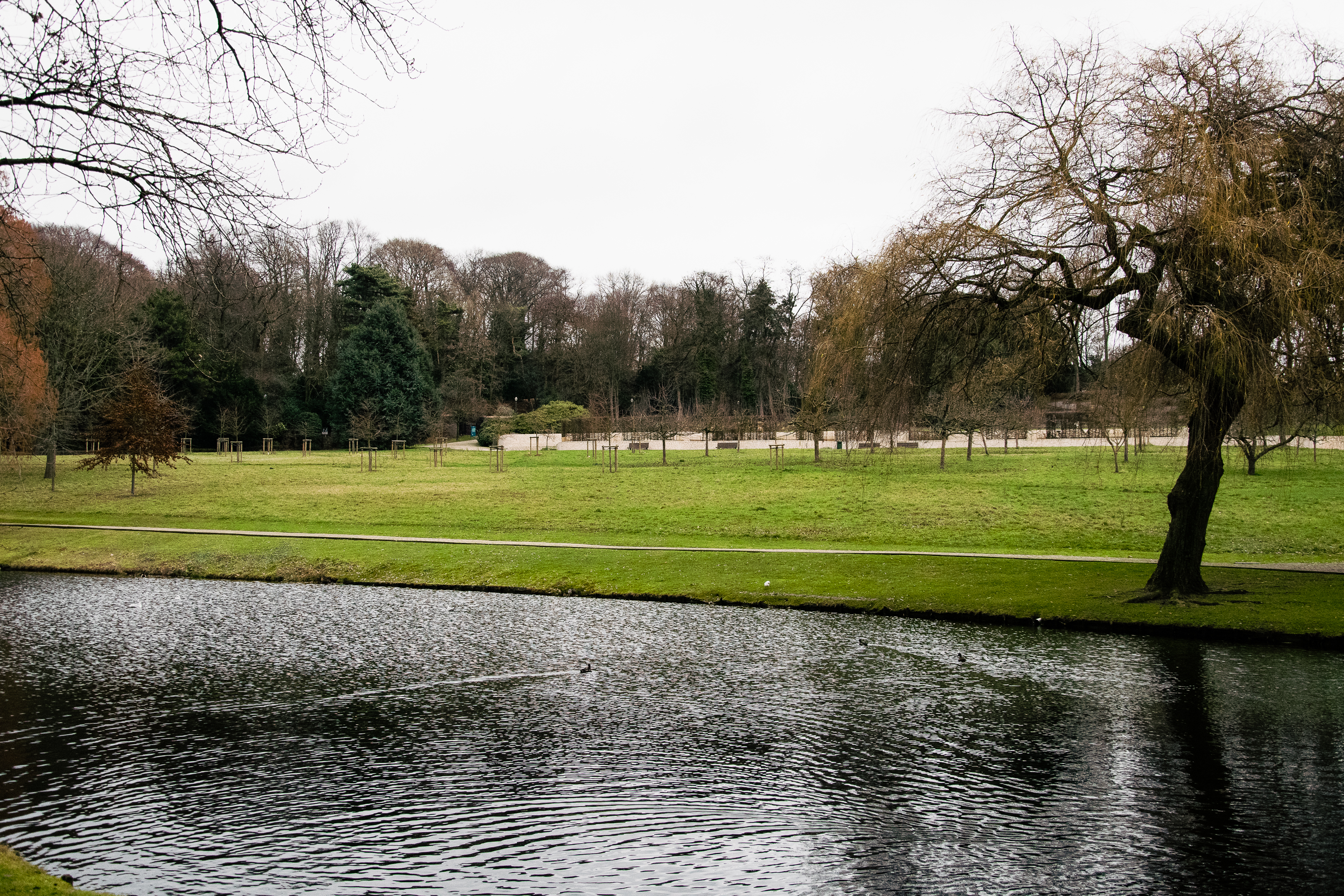 Etang du Jardin Jean Sobieski